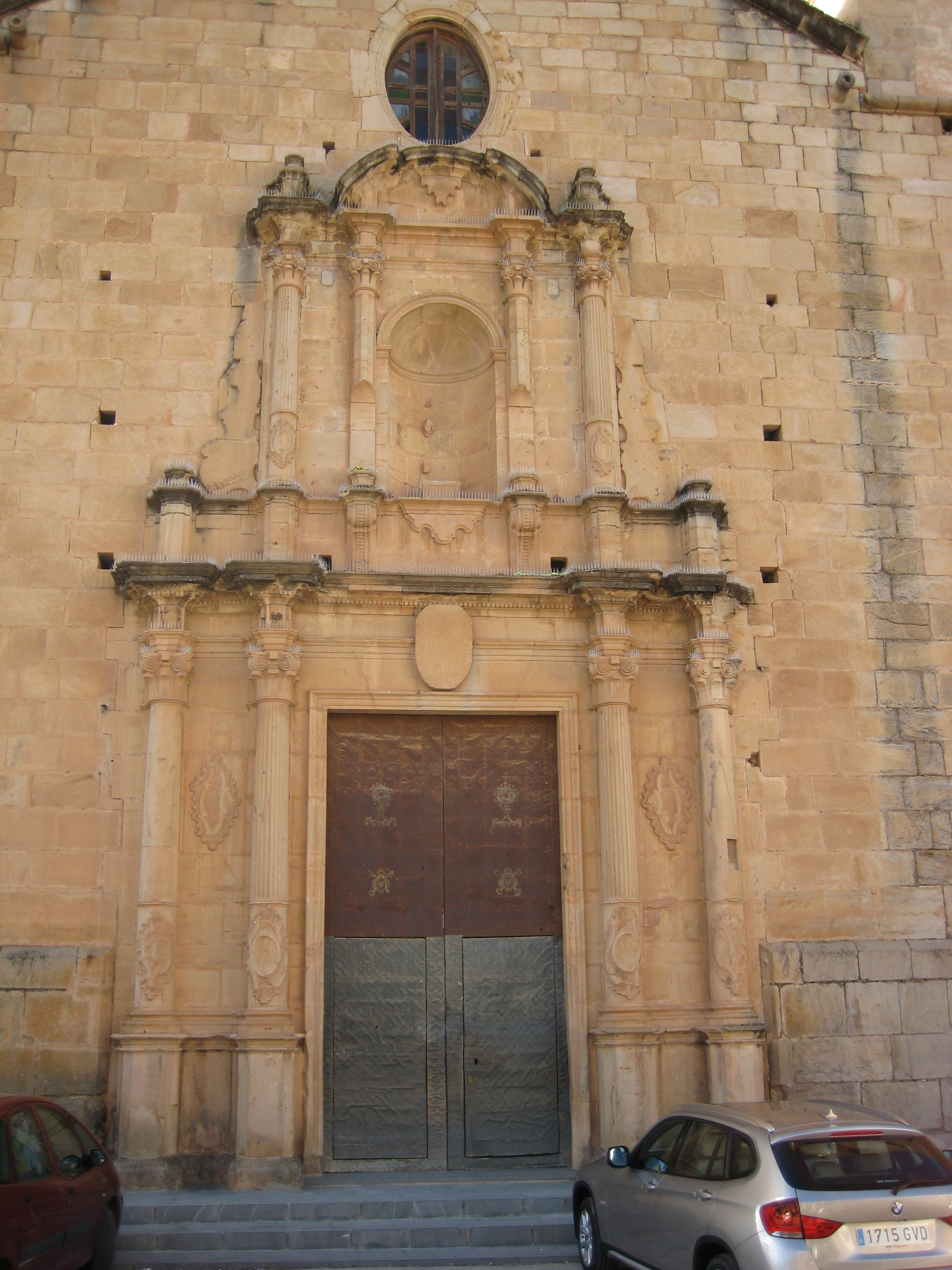 Portada de l'església de la Nativitat de la Mare de Déu de Vilafermosa (Alt Millars)